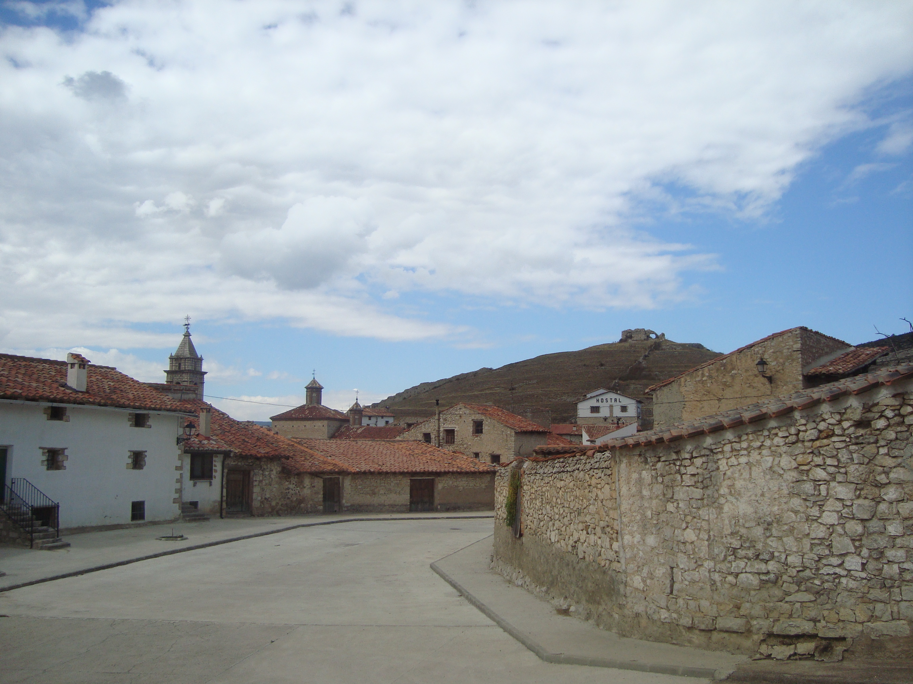 Castillo de Fortanete en lo alto. A la izquierda se puede ver la torre de la iglesia de la Purificación.